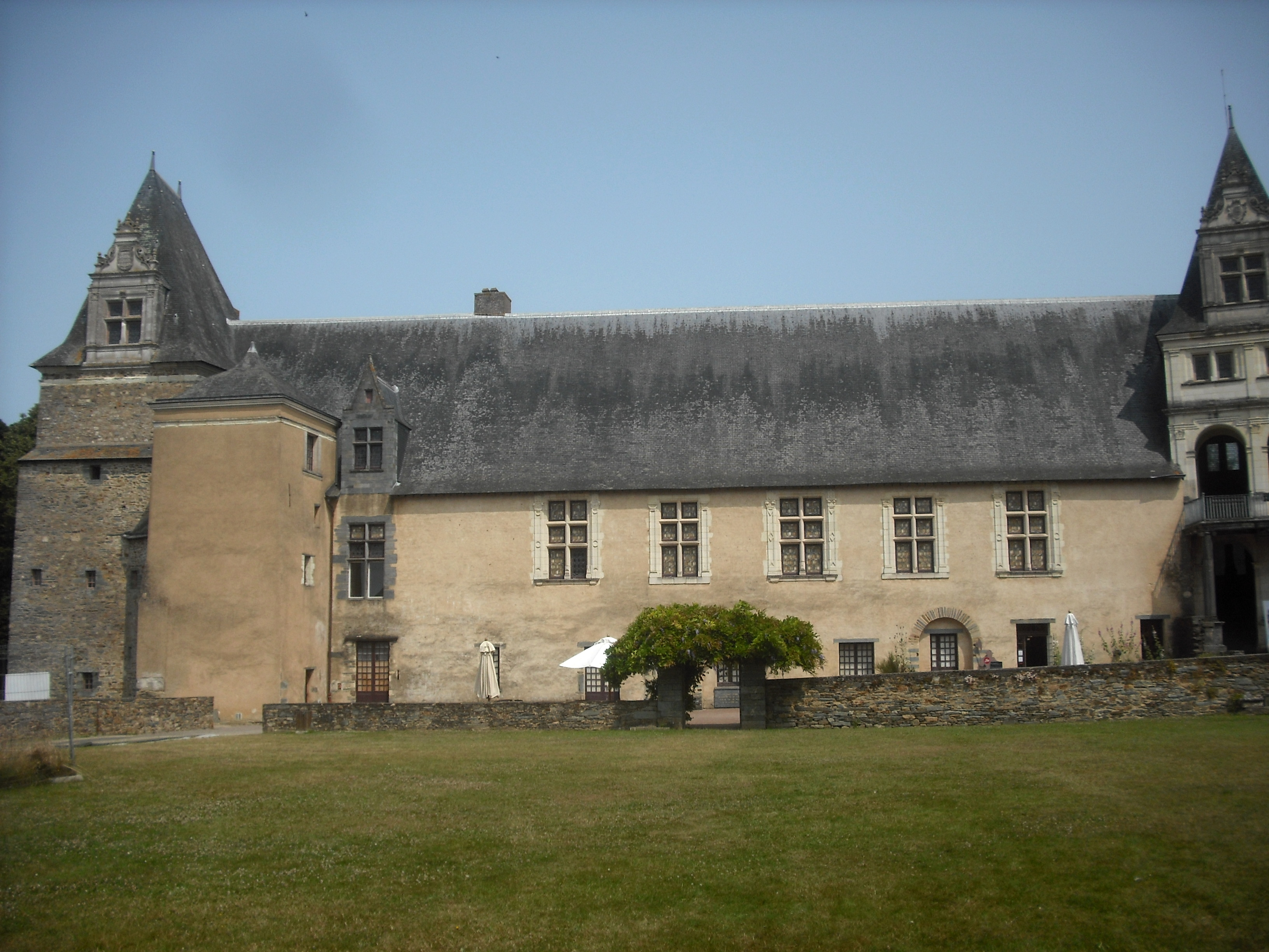 Façade intérieure du Bâtiment des Gardes, Château de Châteaubriant, France.